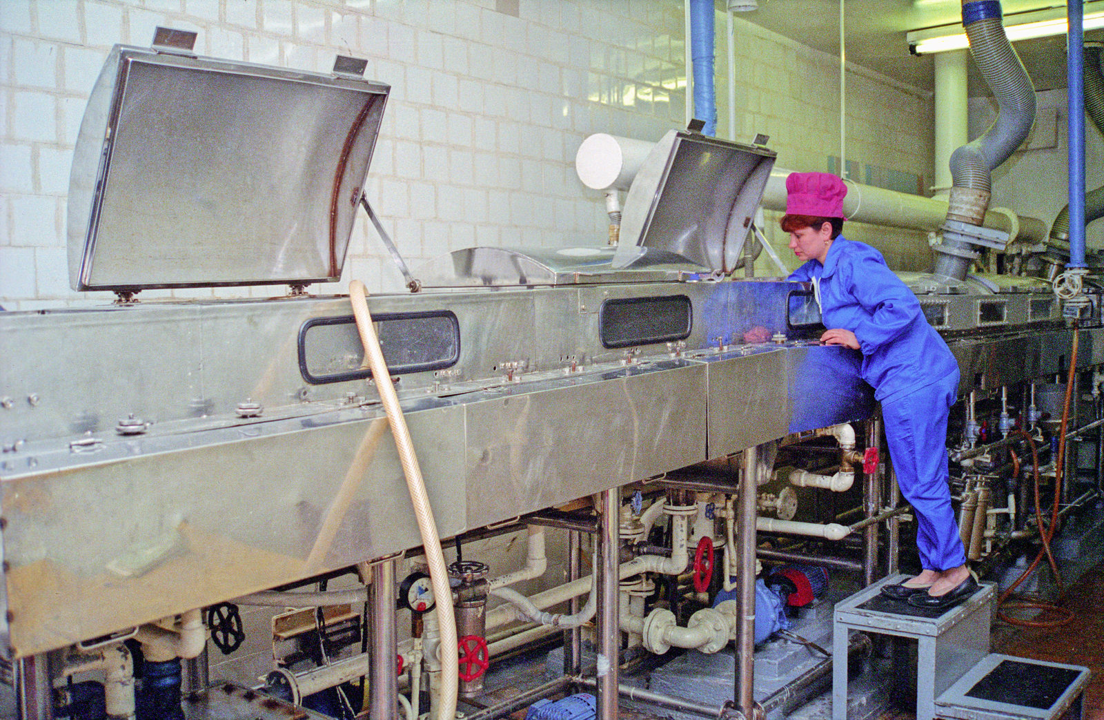 Елена Кокорина (резчик стекла) заливает моющее средство в японскую поливную машину «Конисироку» (Konishiroku). Начальная часть машины находится в светлом отделении, здесь происходит химическая и ультразвуковая очистка стекла. Далее стекло сушится и поступает по конвейеру в тёмное отделение, где на него поливается эмульсия. Резчик стекла участвует в процессе полива на этапе подачи стекла. Отделение полива, хозрасчётное структурное подразделение (ХСП) «Микрон» ОАО «Компания Славич».